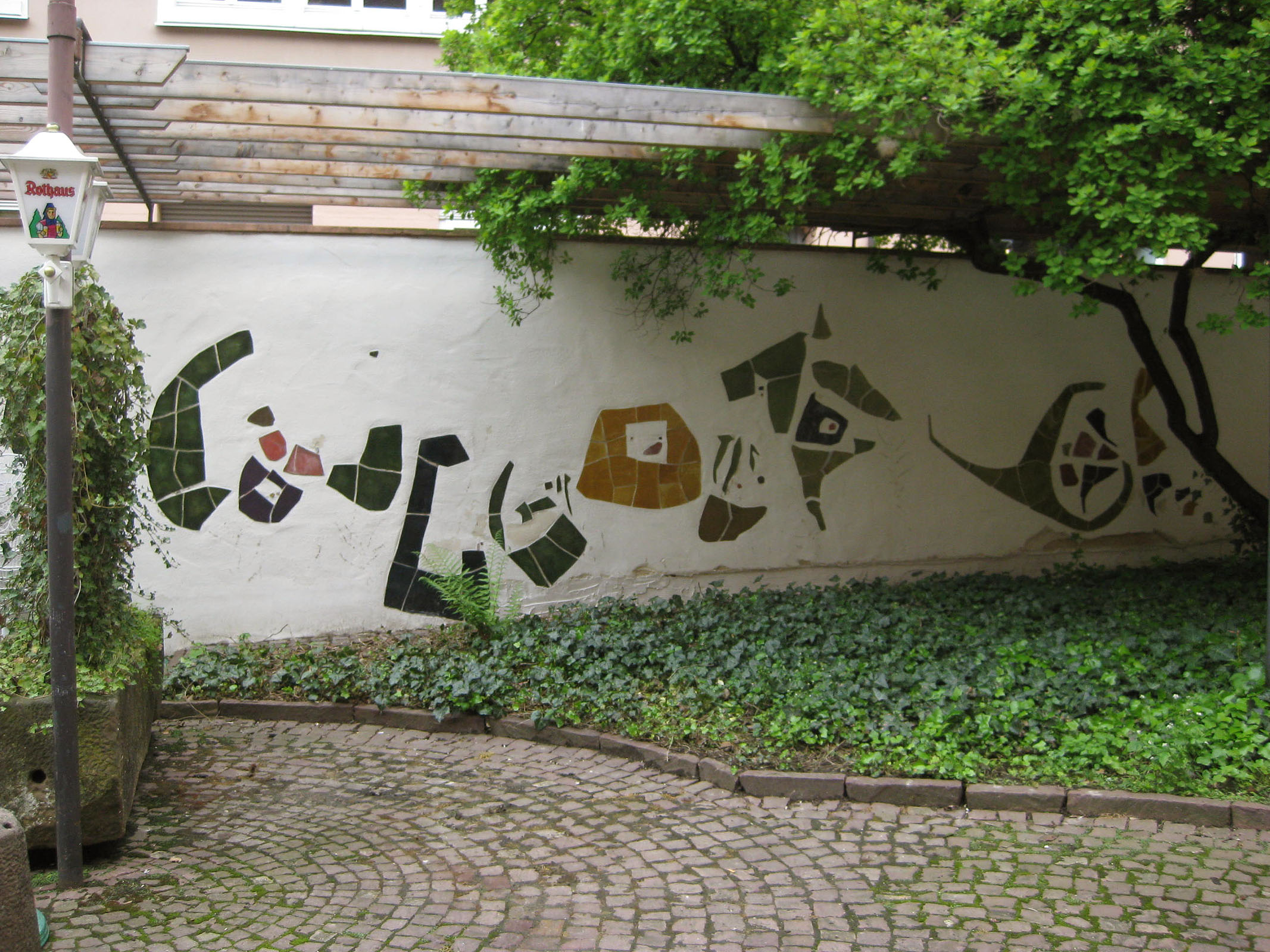 Julius Bissier (Entwurf), 1955/56,Wandmosaik von Richard Bampi, - Deutschland, Baden-Württemberg, Freiburg im Breisgau, Alte Uni Innenhof, Bertoldstr.